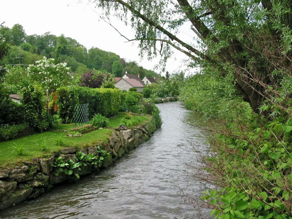 La Mauldre à La Falaise (Yvelines) Photo JH Mora, mai 2005